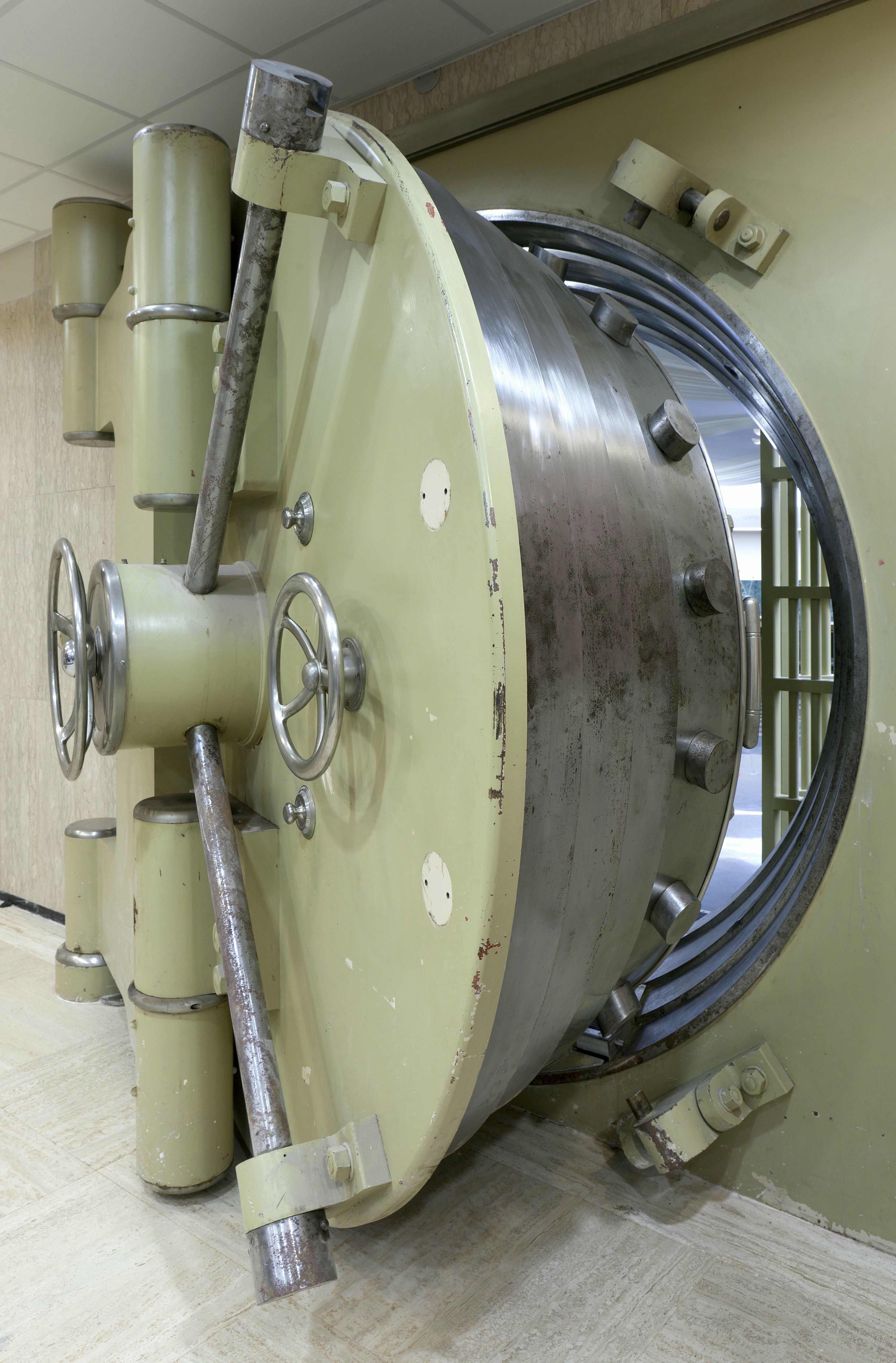 v.m. Amsterdamse Bank/Incassobank: Interieur, kelder, detail van het couponhallen: halfgeopende kluisdeur